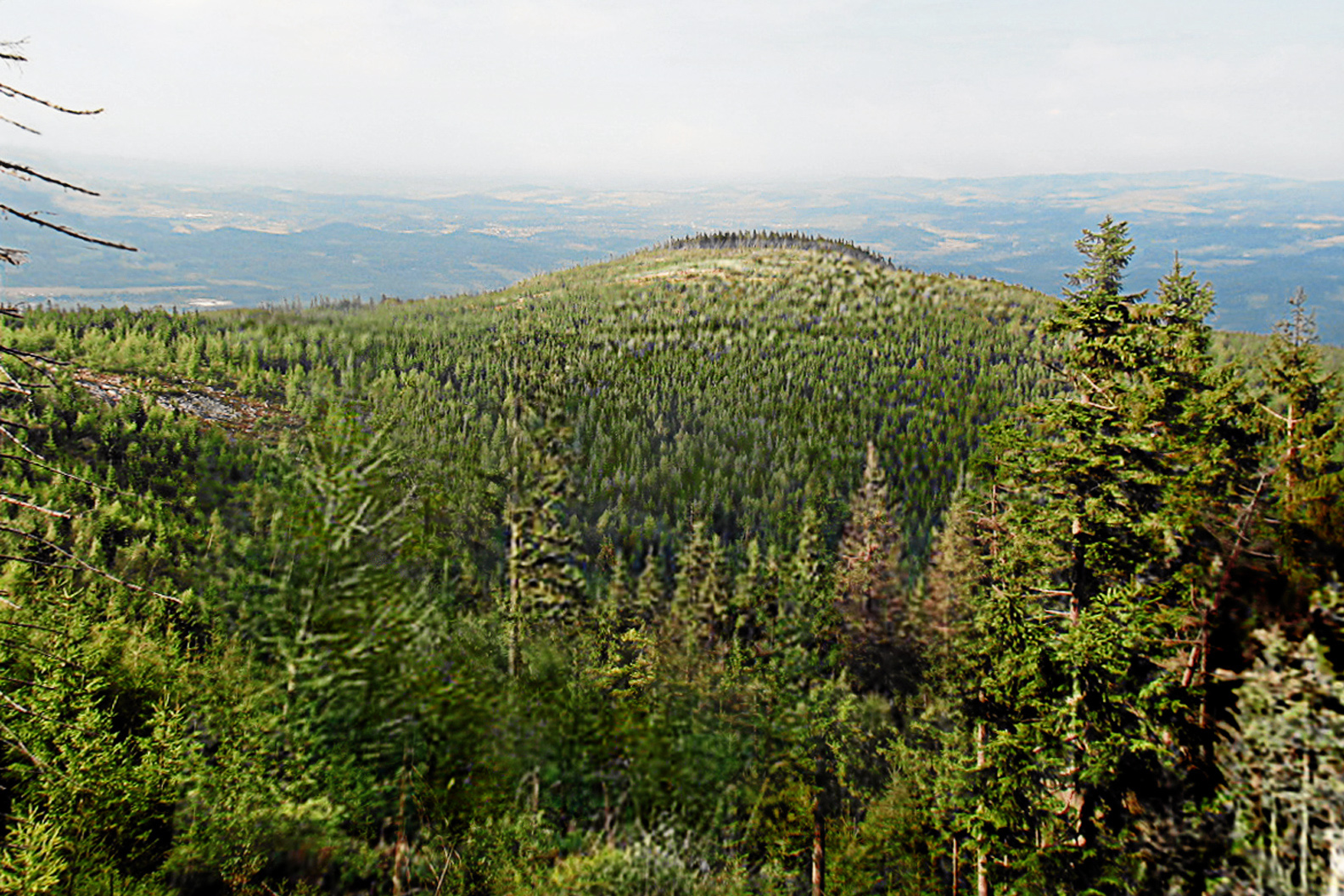 Blick vom Tabaksteig in Richtung Wołowa Góra (deutsch Ochsenberg), einer der wenigen Berge über tausend Meter auf der polnischen Seite des Riesengebirges.